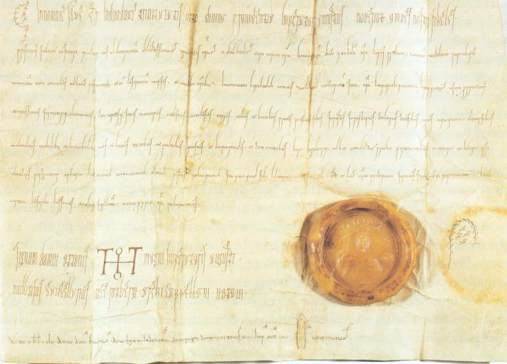 Schenkungsurkunde Kaiser Ottos II. für Heinrich d. Zänker. Otto II. schenkt die Königsburg Bamberg samt Zugehörungen und den Ort Stegaurach an seinen Neffen Herzog Heinrich den Zänker von Bayern.